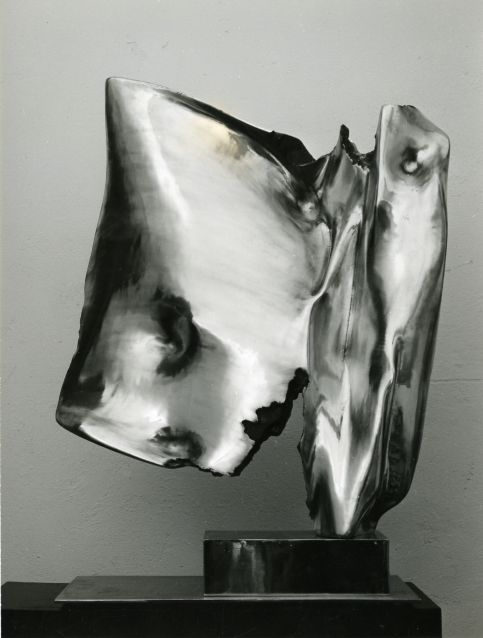 Giò Pomodoro, Sculture in bronzo, anni '60 ca. Servizio fotografico : Italia, 1965 / Paolo Monti. - Stampe: 4 : Positivo b/n, gelatina bromuro d'argento/ carta, 24x30. - ((Al verso delle stampe manoscritti i numeri dei provini corrispondenti?: 37686; timbro a inchiostro con copyright (Corso Sempione - Milano). - Sul coperchio della scatola iscrizione didascalica manoscritta a pennarello nero: "Scultura". - Fonte: Monografia di Ballo, Guido: Dalla poetica del segno alla presenza continua: Arnaldo e Giò Pomodoro, Milano, Luigi Maestri Editore (1962)